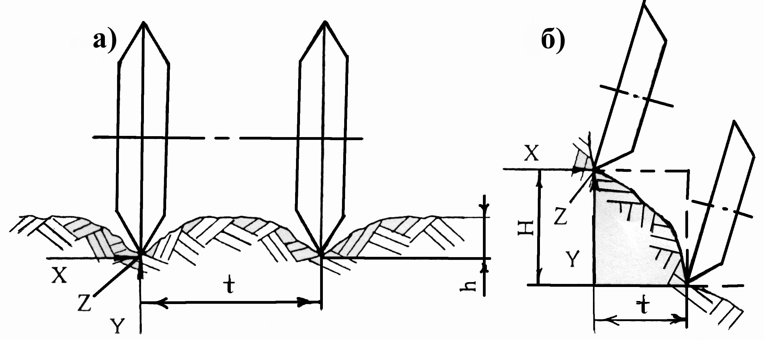 Схема